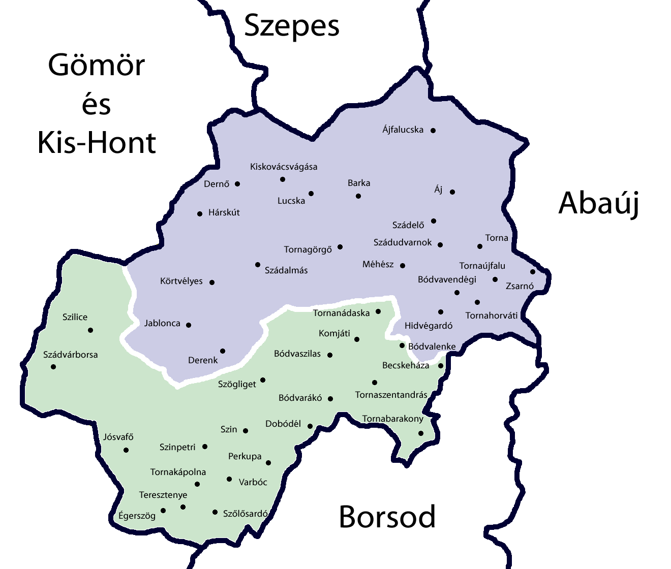 Torna vármegye községei és járásai 1873-ban